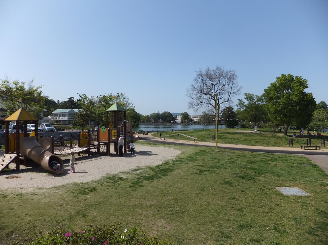 仏生山公園（香川県高松市仏生山町）